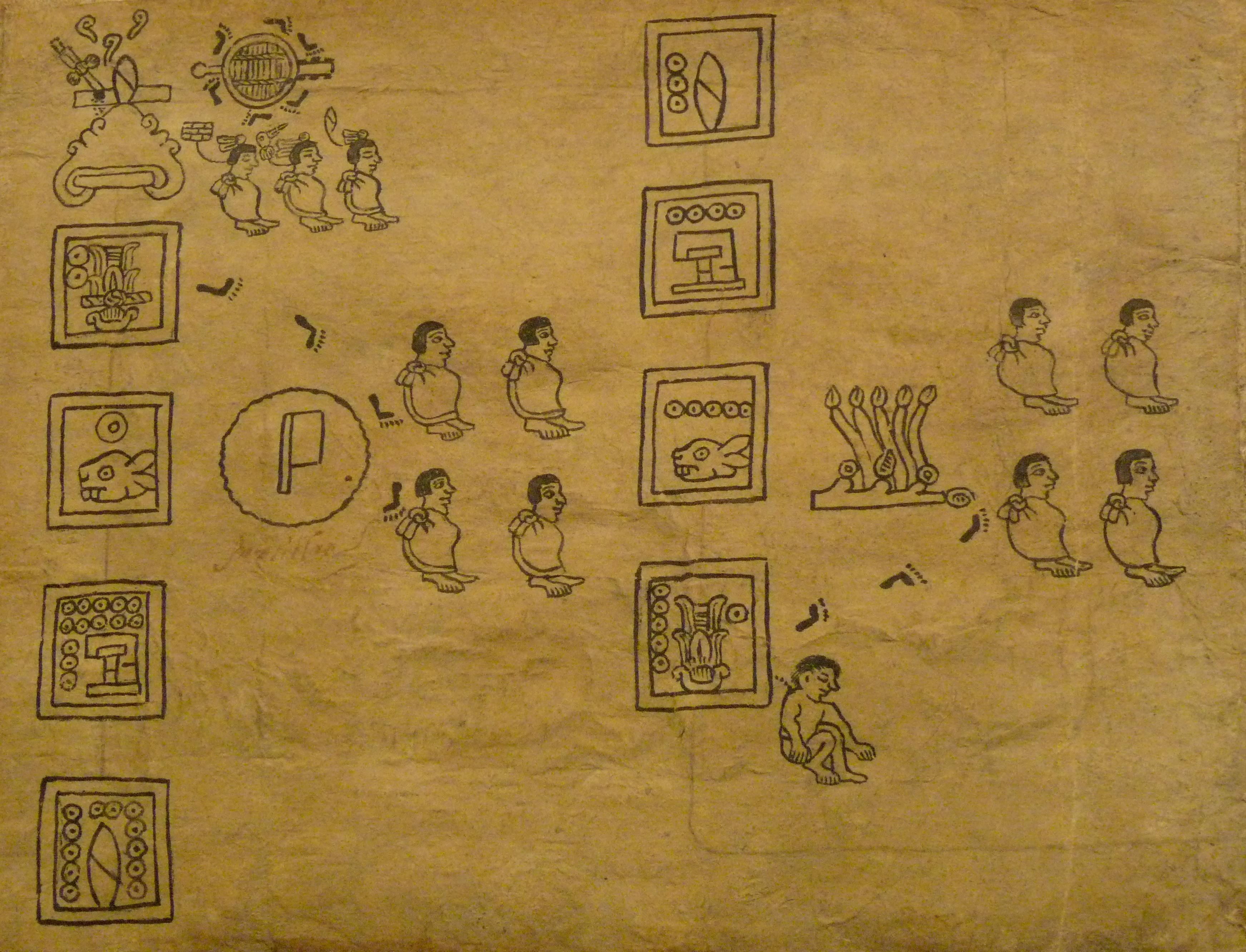 Codex Boturini (also known as Tira de la peregrinación), folio 15